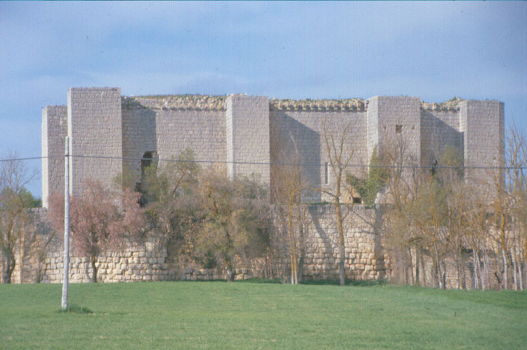 Castillo - Villalba de los Alcores (Valladolid) - Diapositiva 48 x 48 Color